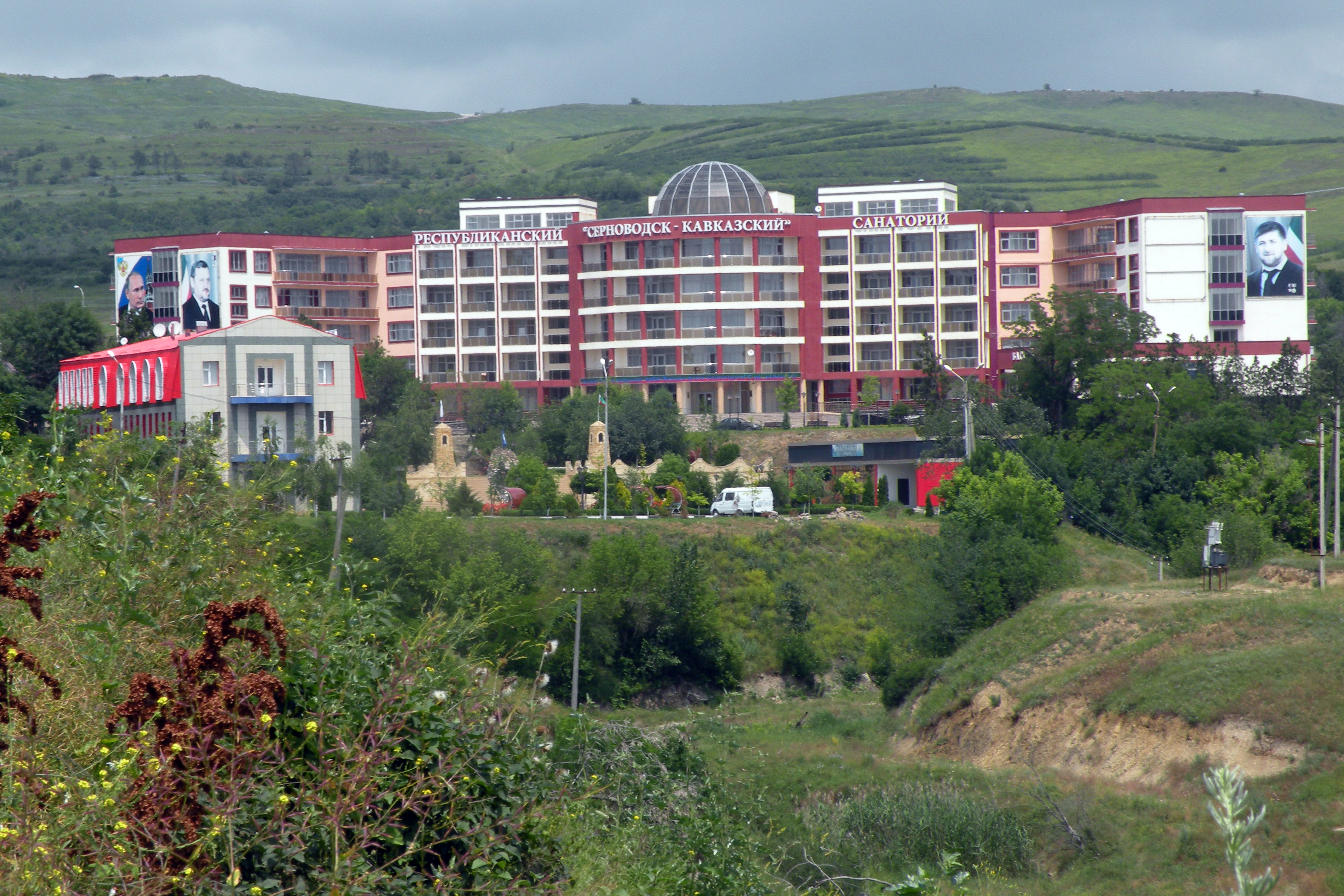 Санаторий Серноводск-Кавказский в Чечне, июнь 2016